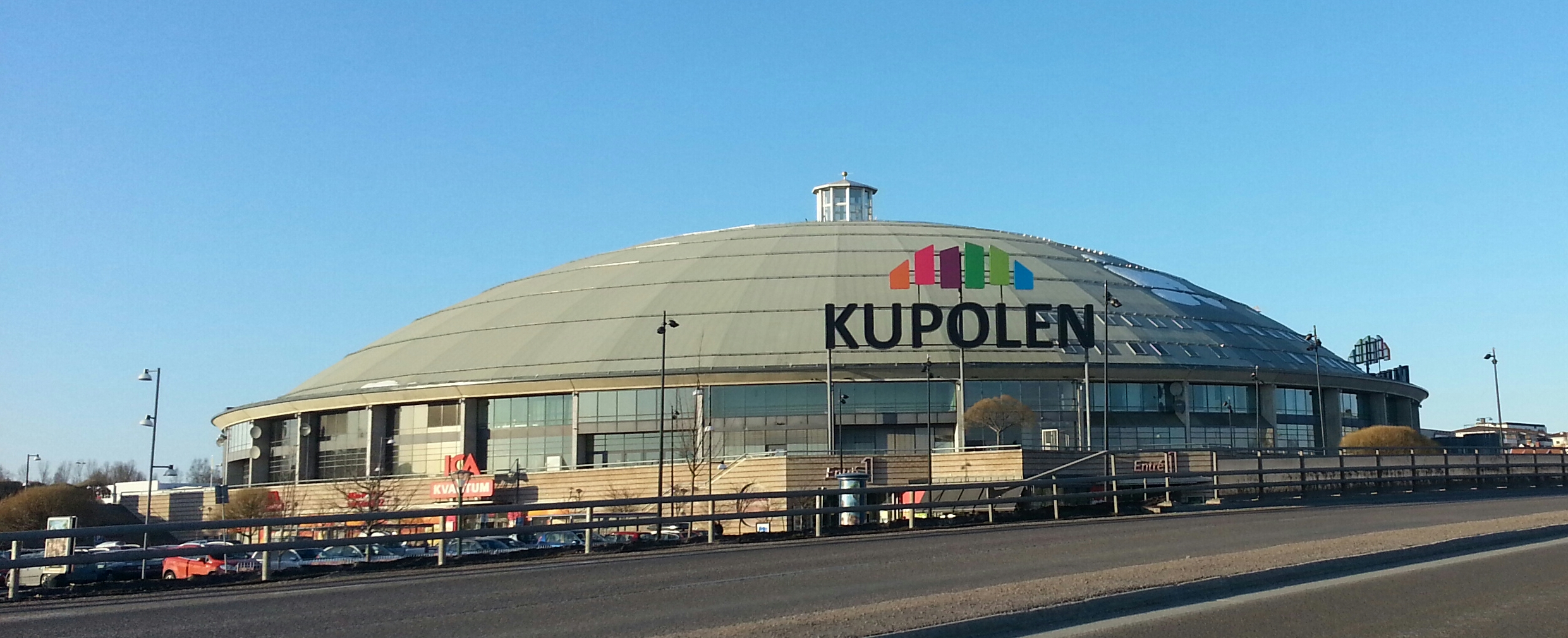 Kupolen, Borlänge, Dalarna, Sweden.